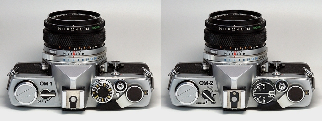 Olympus OM-1 Analog SLR compared to OM-2